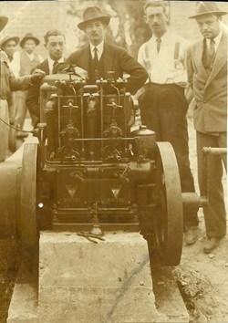 Oscar Valderrama Zagazeta staff and team work.